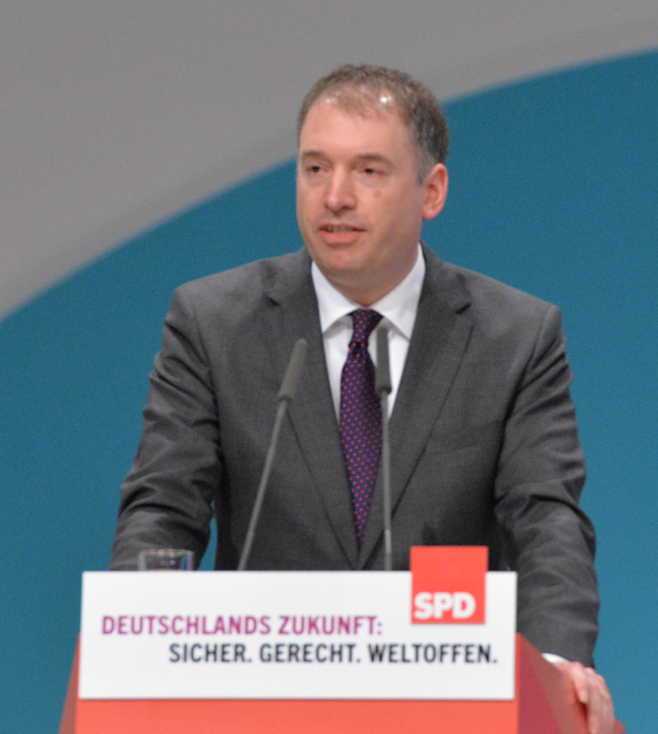 SPD Bundesparteitag Berlin, 10.-12. Dezember 2015, CityCube, Messe Berlin